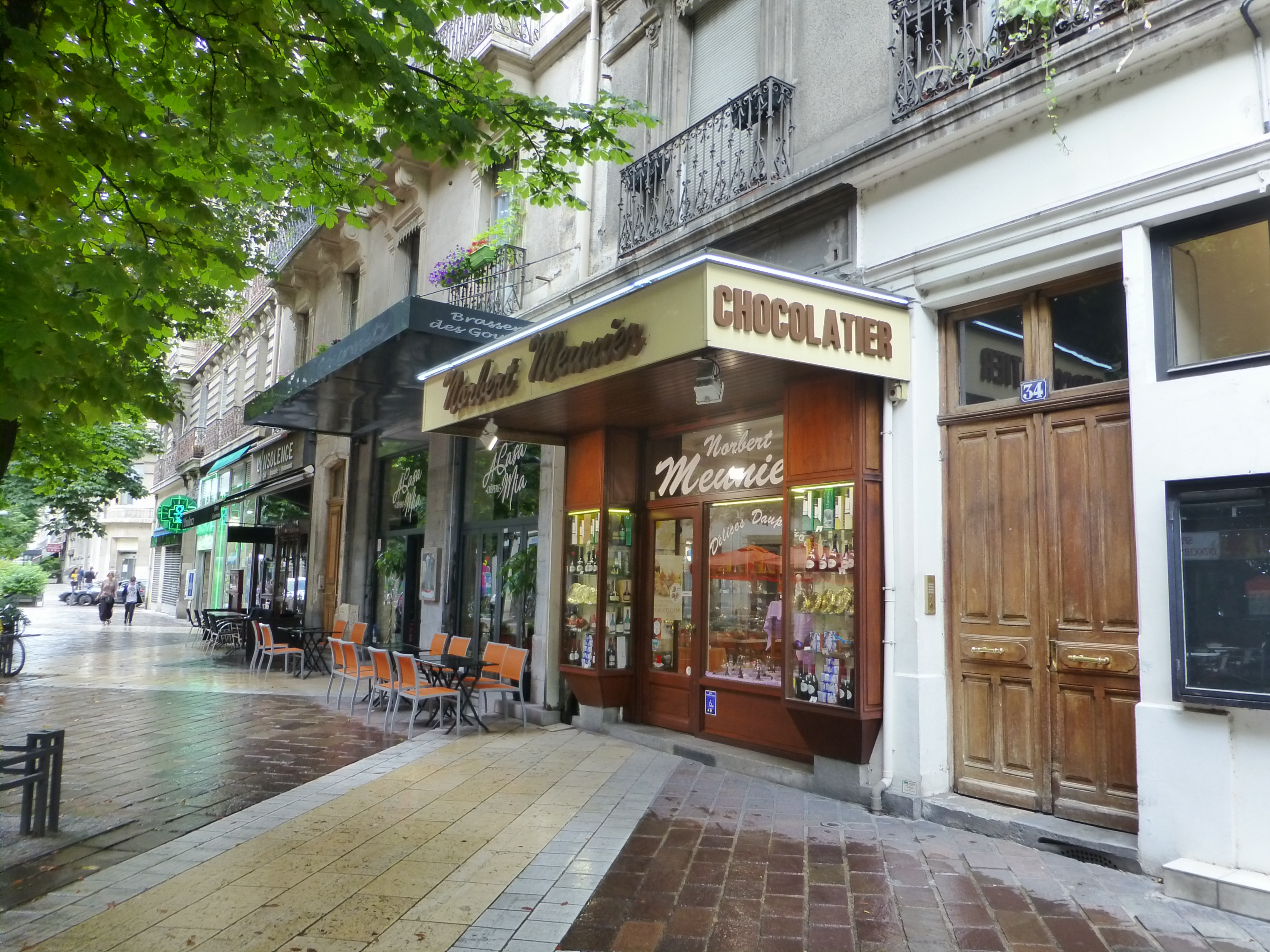 Devanture de chocolaterie à Grenoble, France